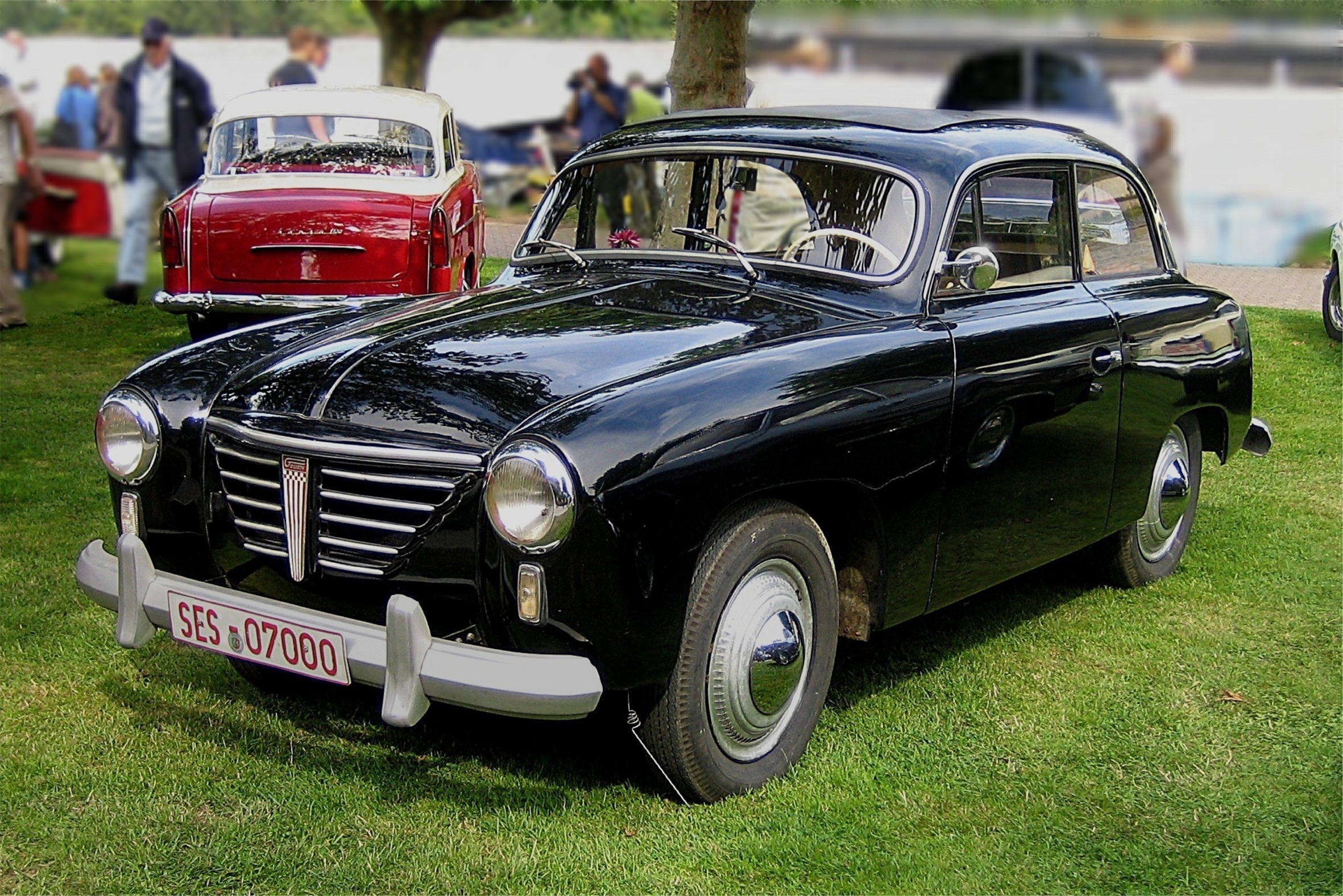 Goliath GP 700 V beim Borgwardtreffen in Andernach license plate changed!